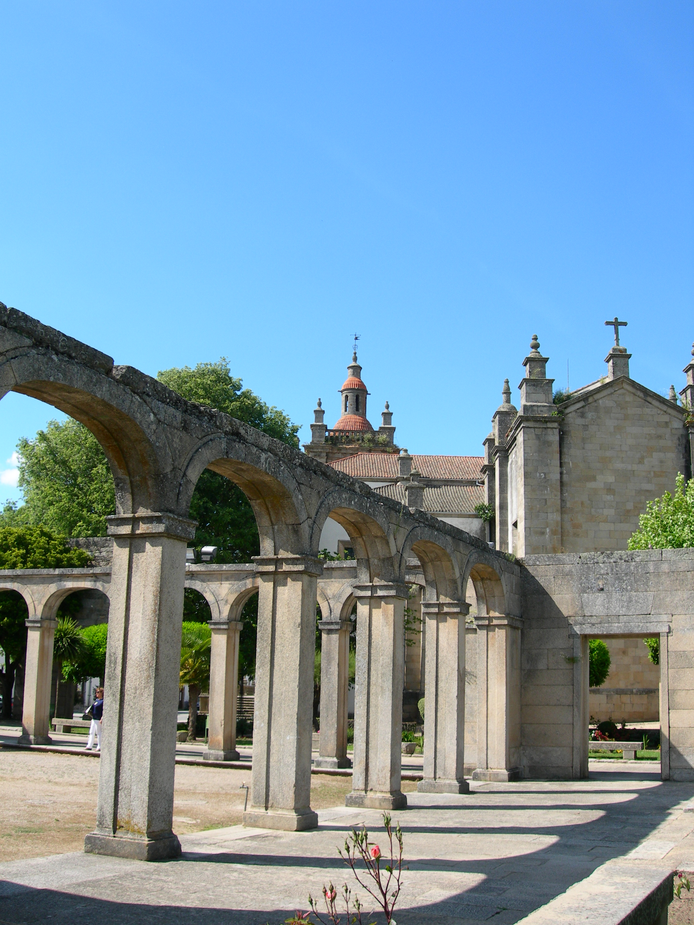 Paço Episcopal de Miranda do Douro II This building is classified as Sem protecção legal. This file was uploaded for Wiki Loves Monuments in Portugal with the unique identifier 97008032.